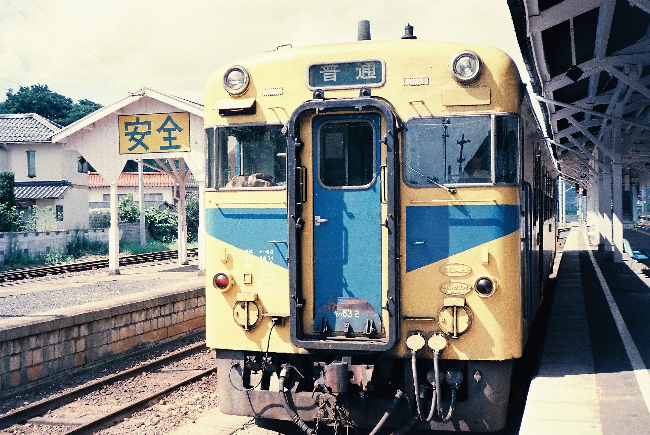 ヤマタノオロチ塗装が施された木次線キハ53 2（宍道駅、1988年7月）